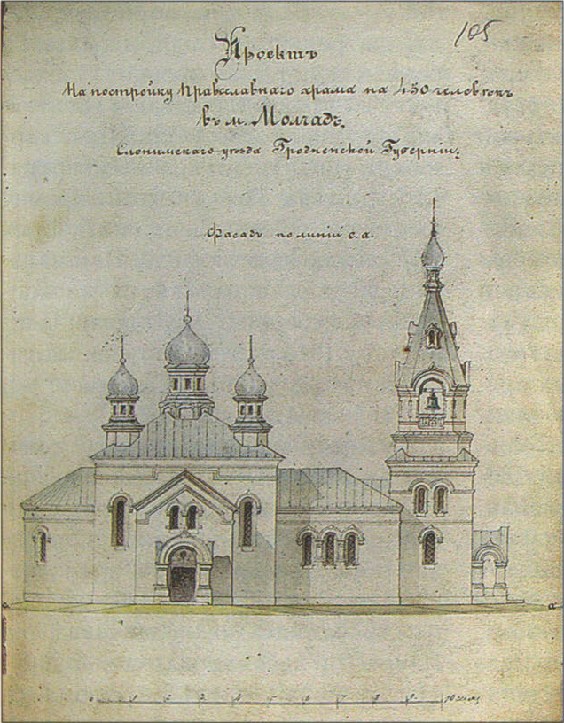 Беларуская (тарашкевіца): Моўчадзь (Moŭčadź). Царква-мураўёўка, праект